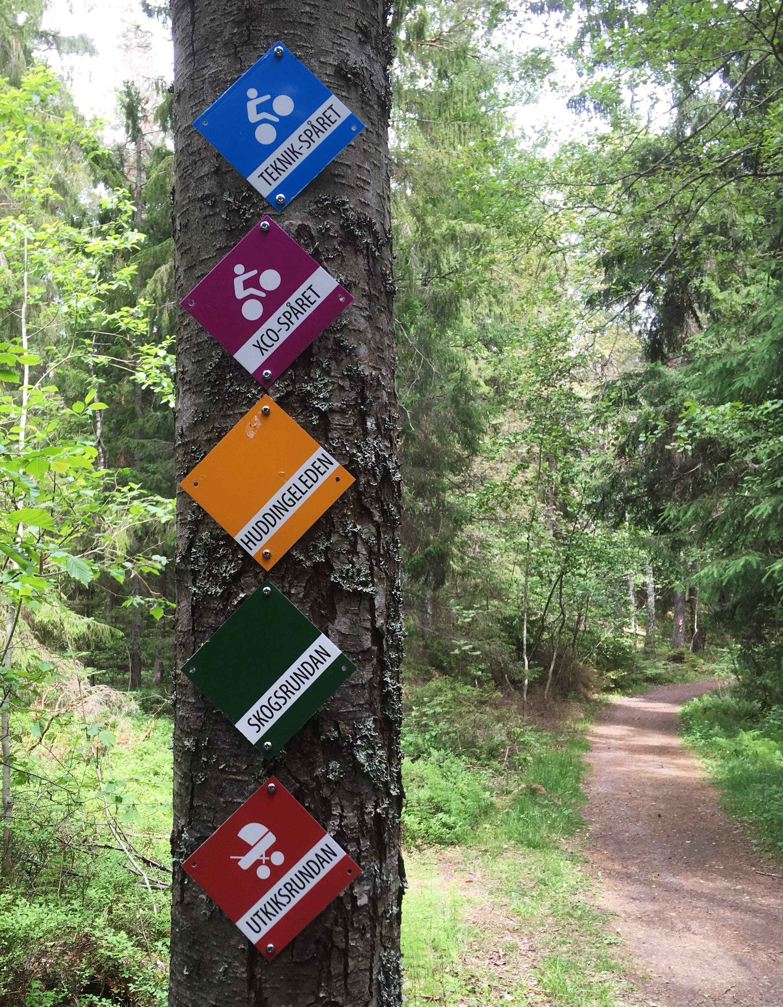 Vandrings- och mountainbikeleder vid Flottsbro